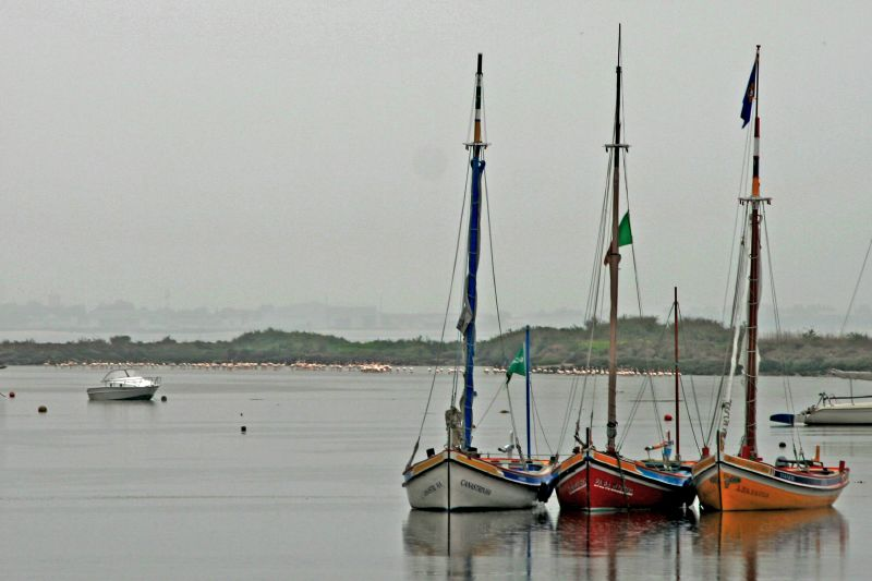 On Explore #233 - 24.2.2008